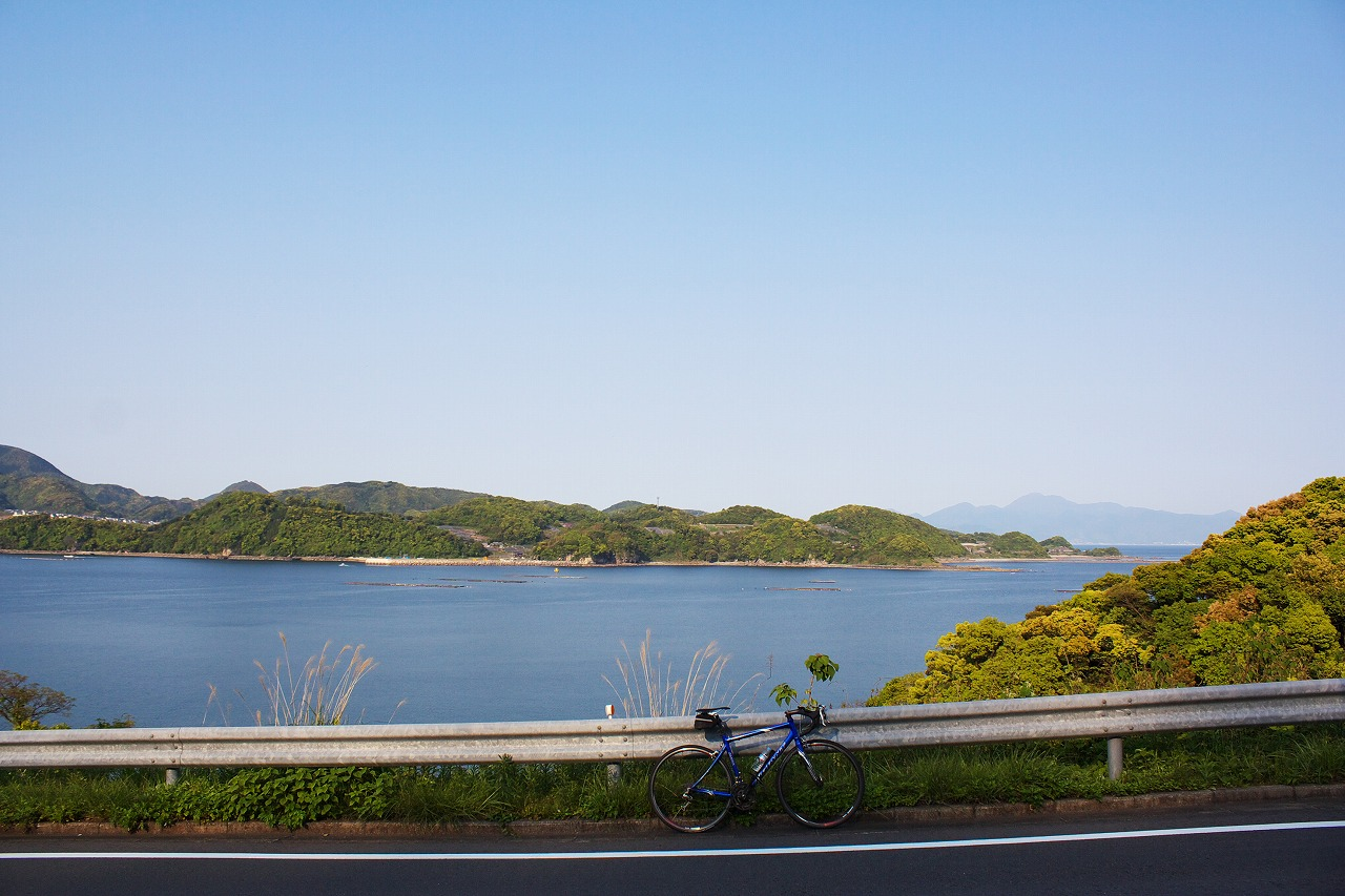 牧島付近の長崎県道34号野母崎宿線からの風景